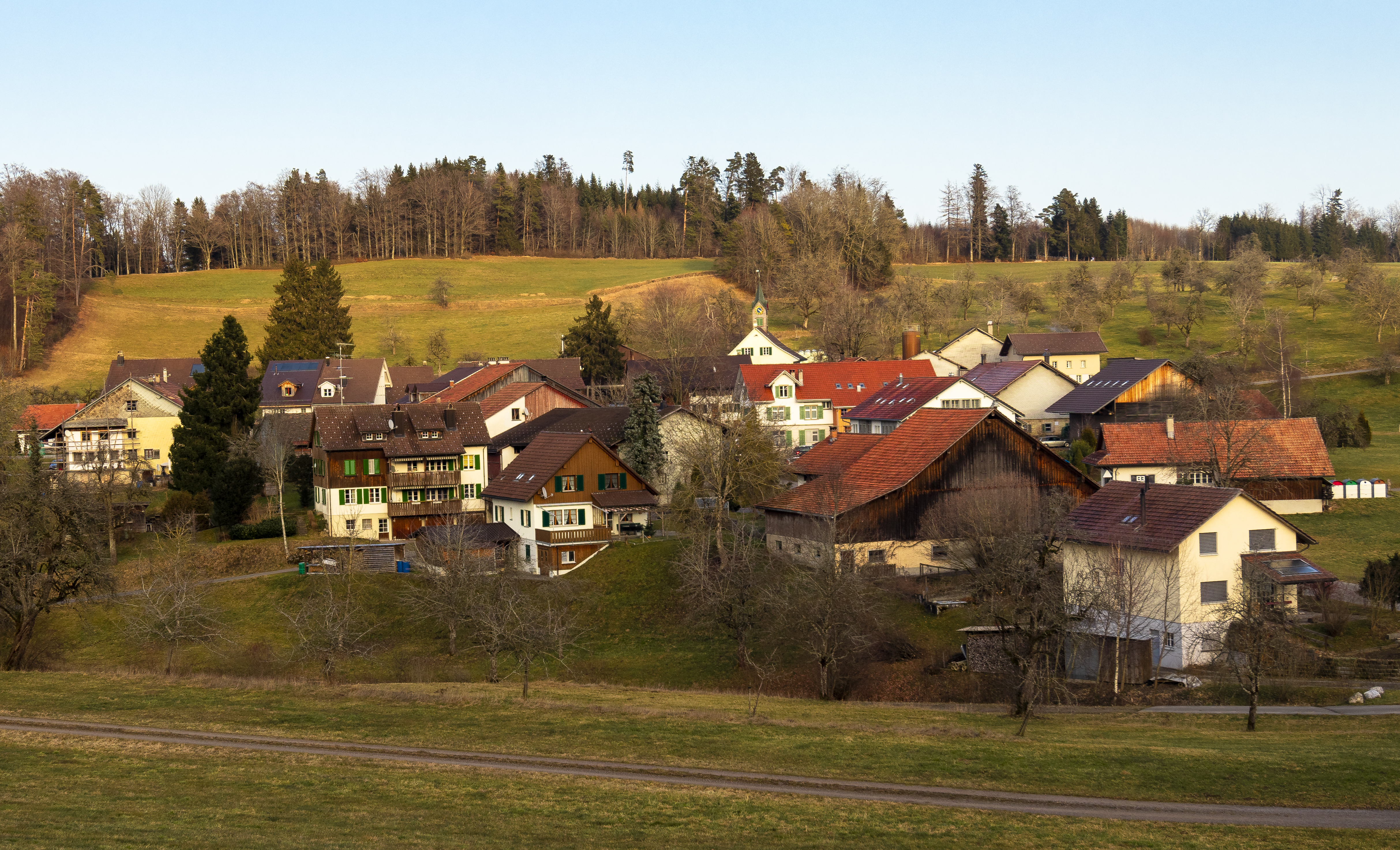 Dorf Hermatswil im Kanton Zürich, Schweiz